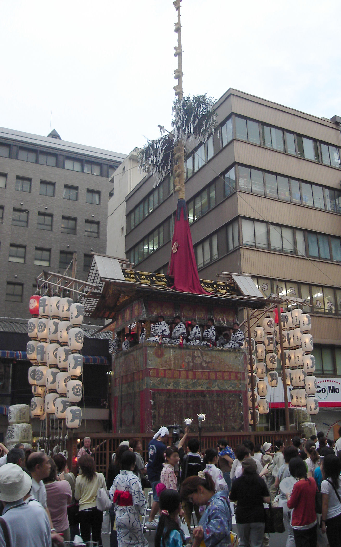 Tsuki Boko(月鉾), Kyoto,Japan